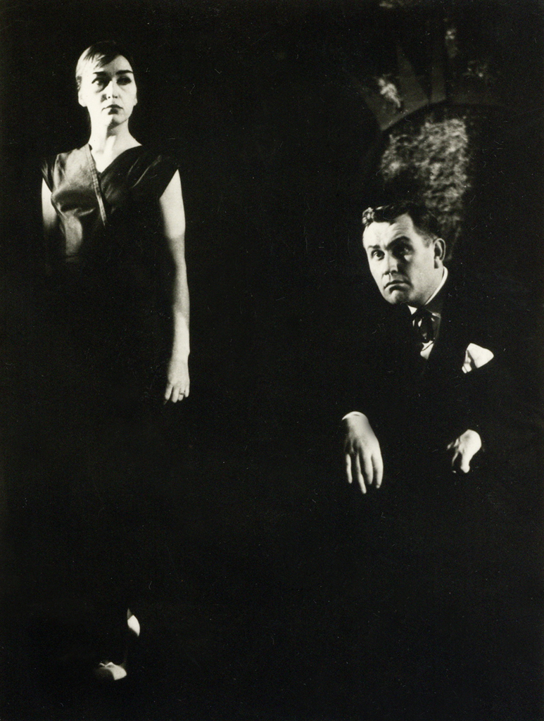 Dominik Smole, Antigona, Oder 57. Na fotografiji: Iva Zupančič (Ismena), Jurij Souček (Kreon).